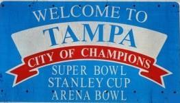 フロリダ州タンパ